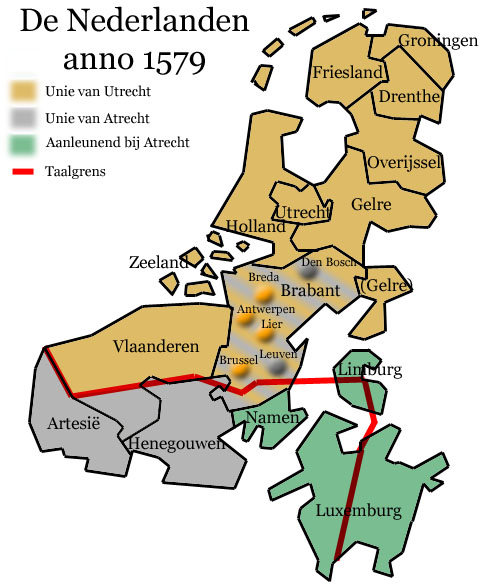 Zelfgemaakte kaart met tekenprogramma.